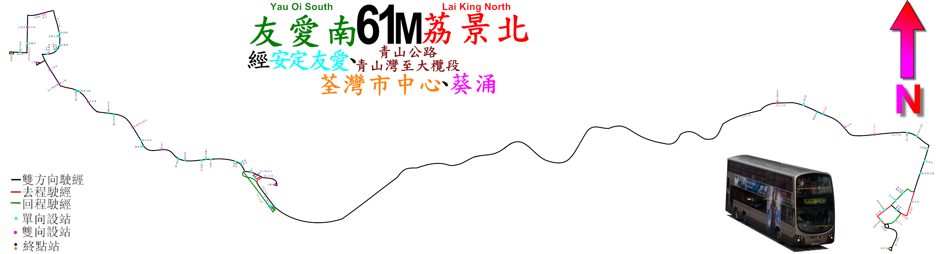 中文（香港）: 九巴61M線的走線圖